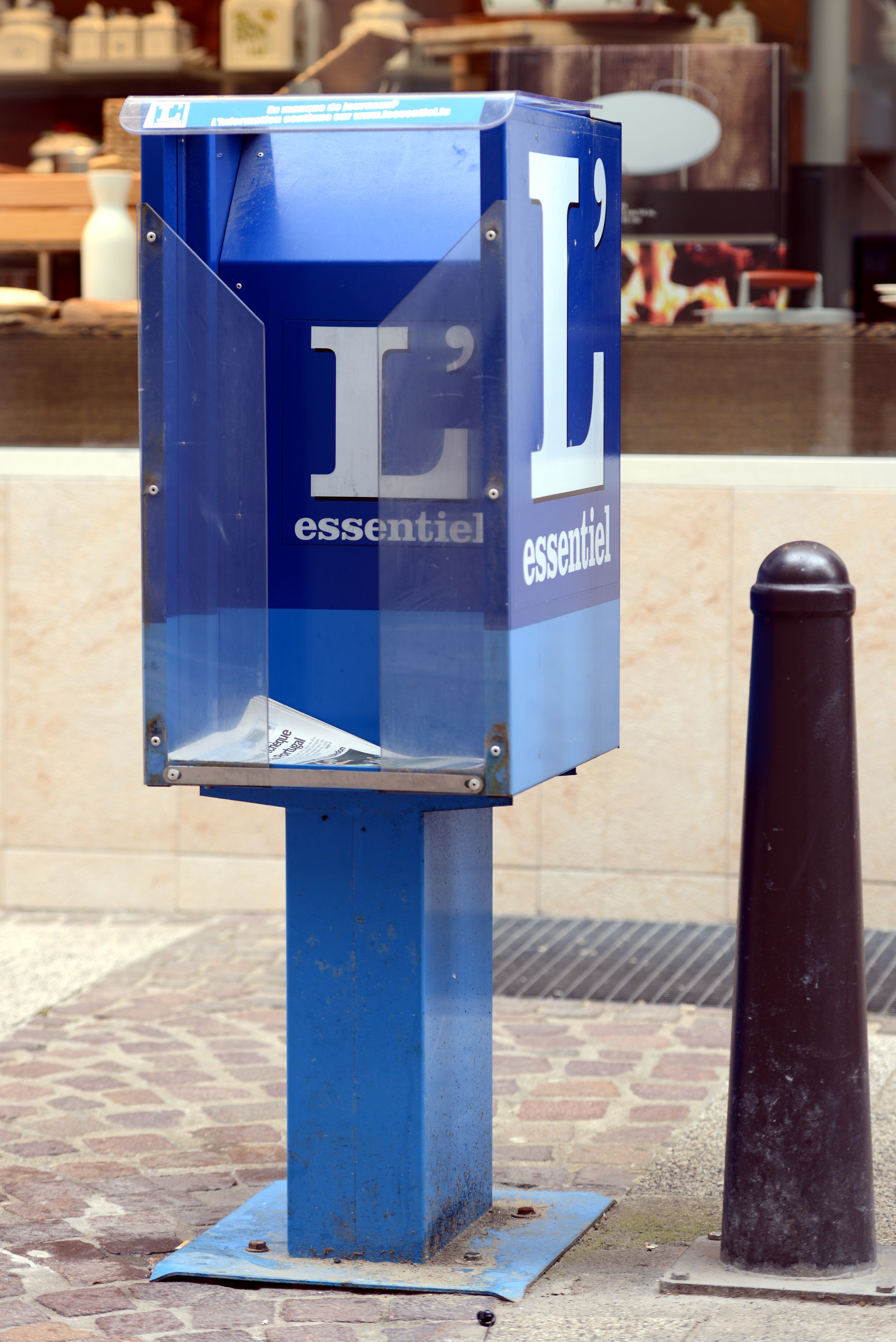 Eng Verdeelerkëscht vum L'essentiel an der Paschtoueschgaass.